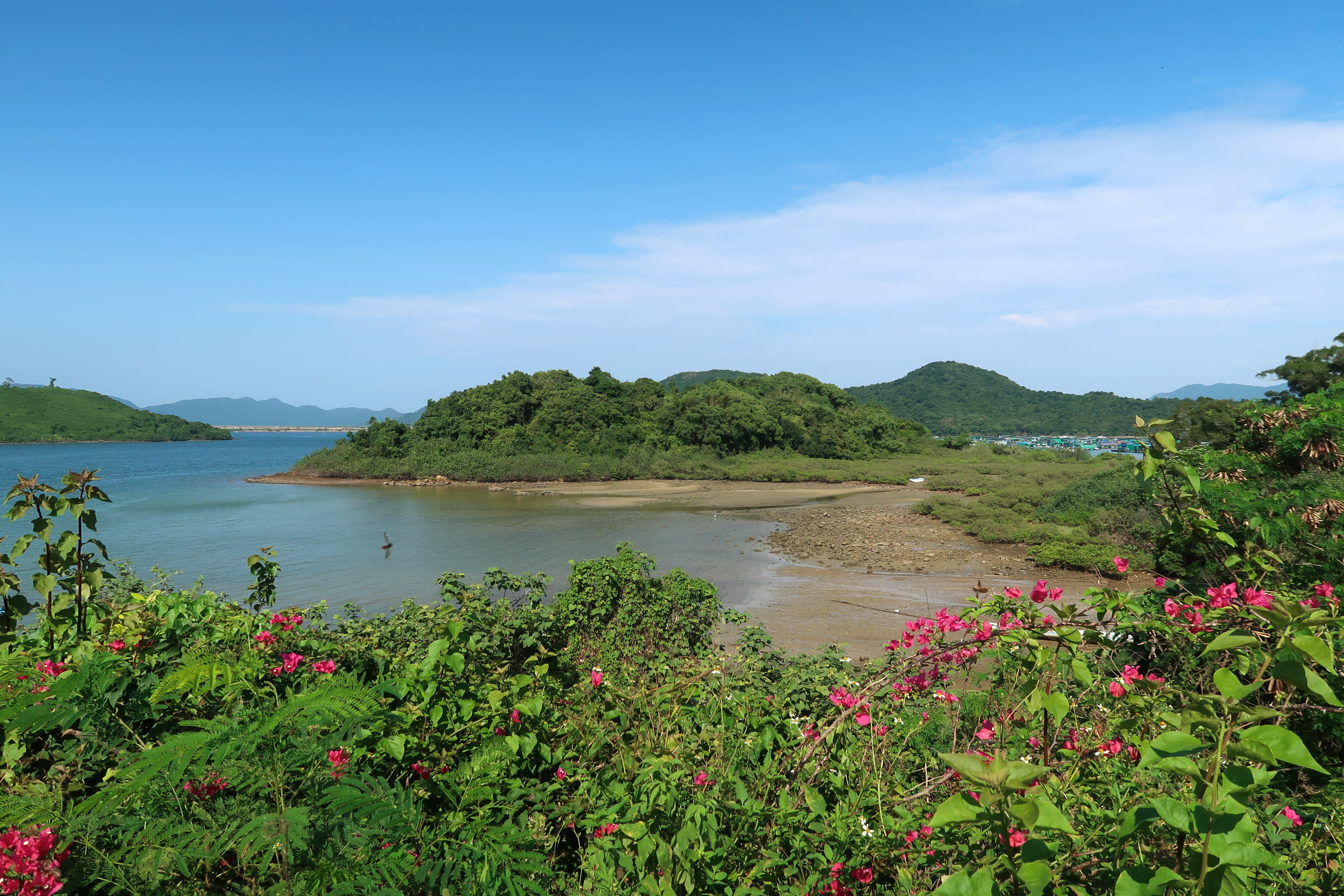 Sam Mun Tsai Mudflat